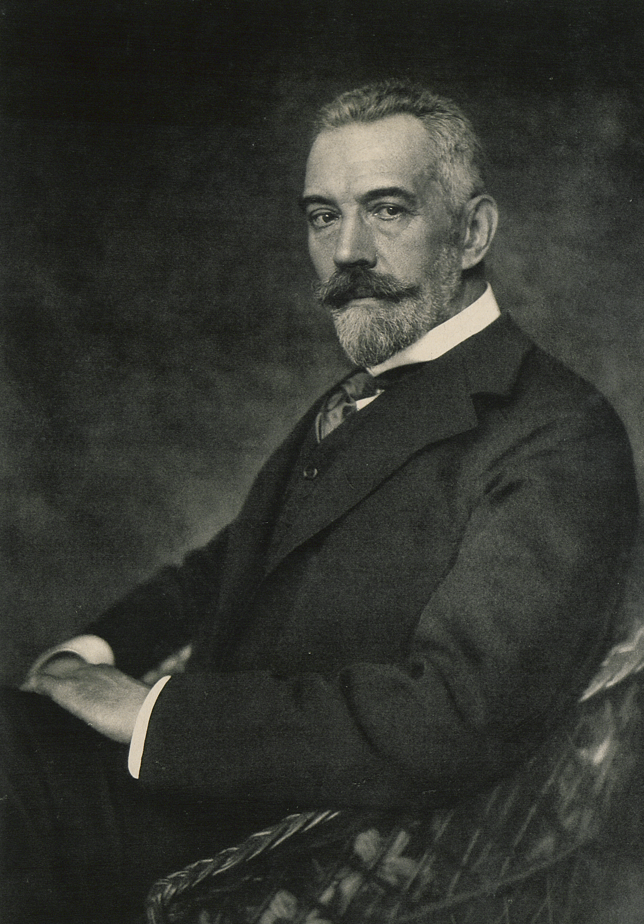 Theobald von Bethmann Hollweg